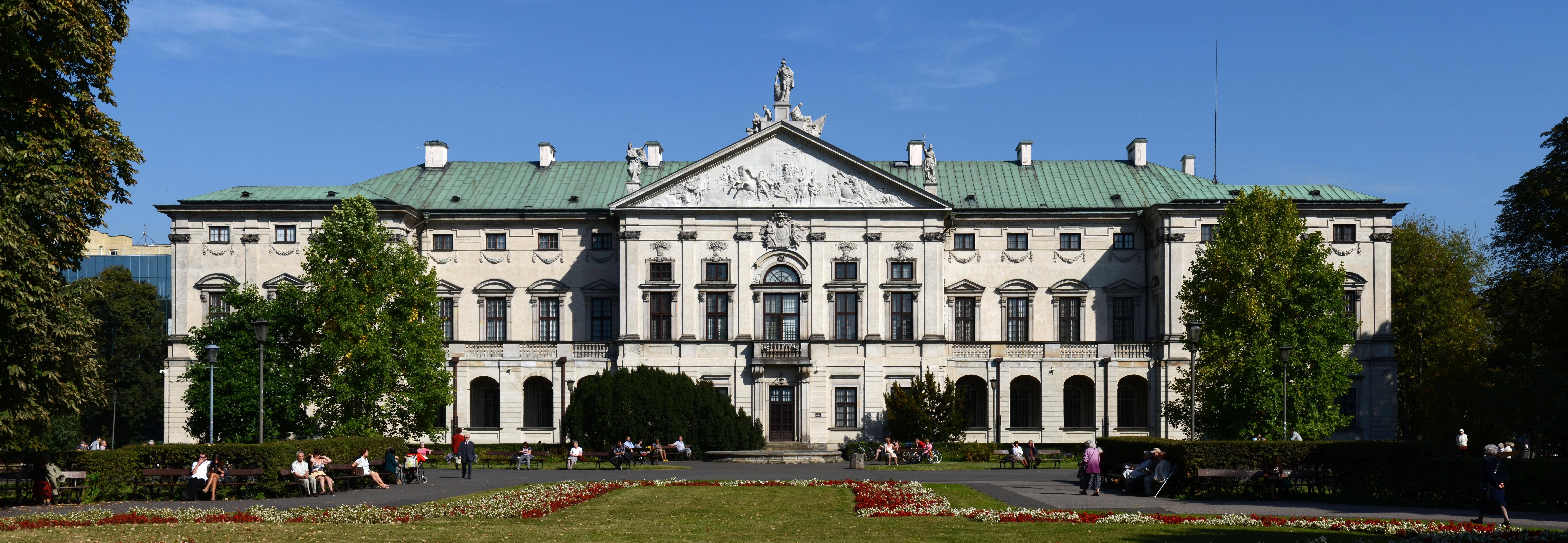 Pałac Krasińskich w Warszawie widziany od strony ogrodu Krasińskich.